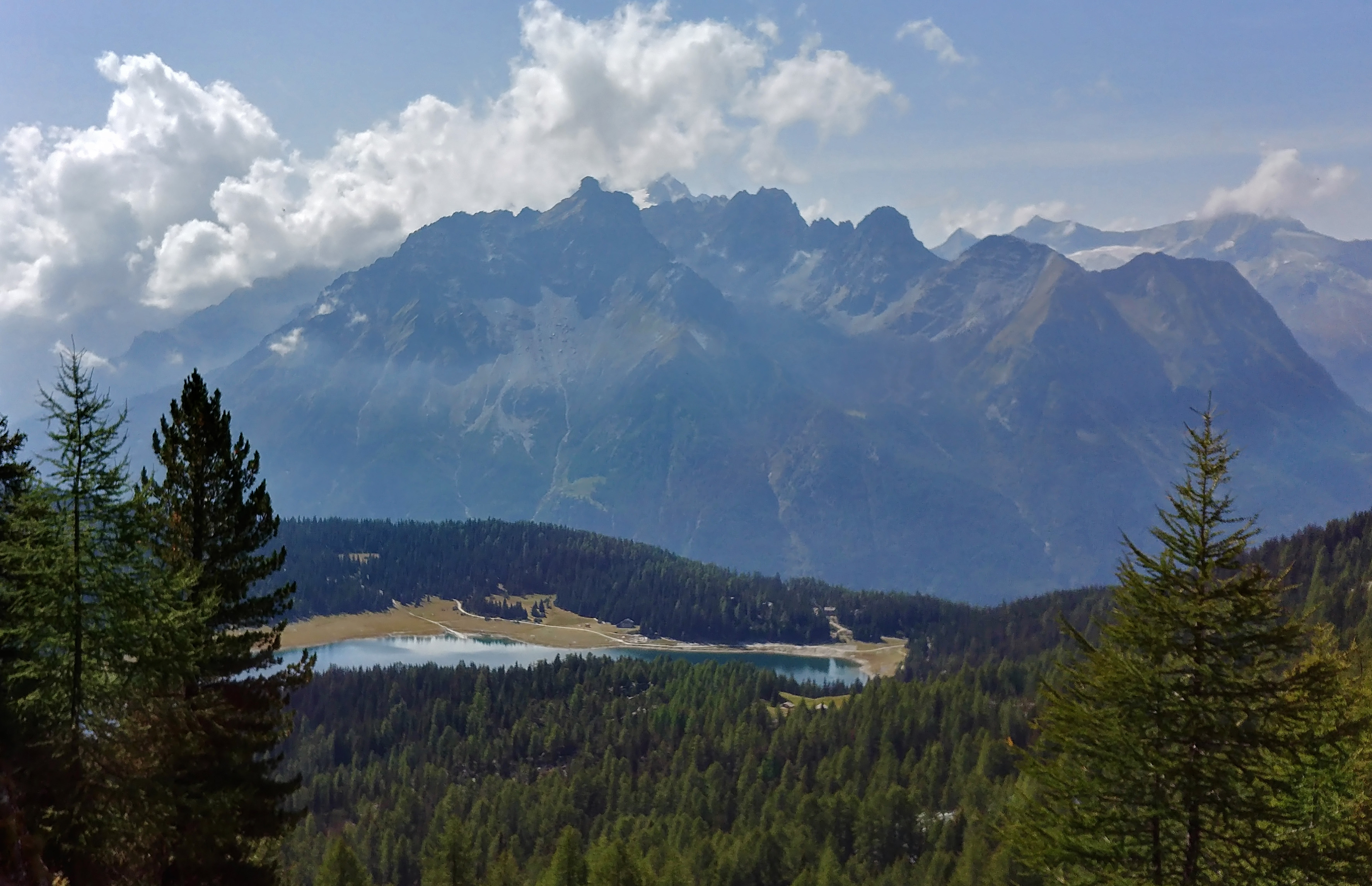 Panorama verso il lago Palù da est